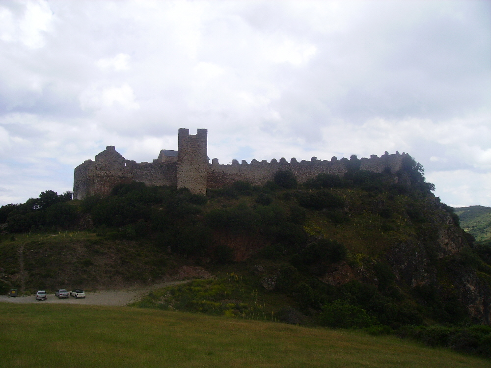 Vista del flanco sur del Castillo de Cornatel